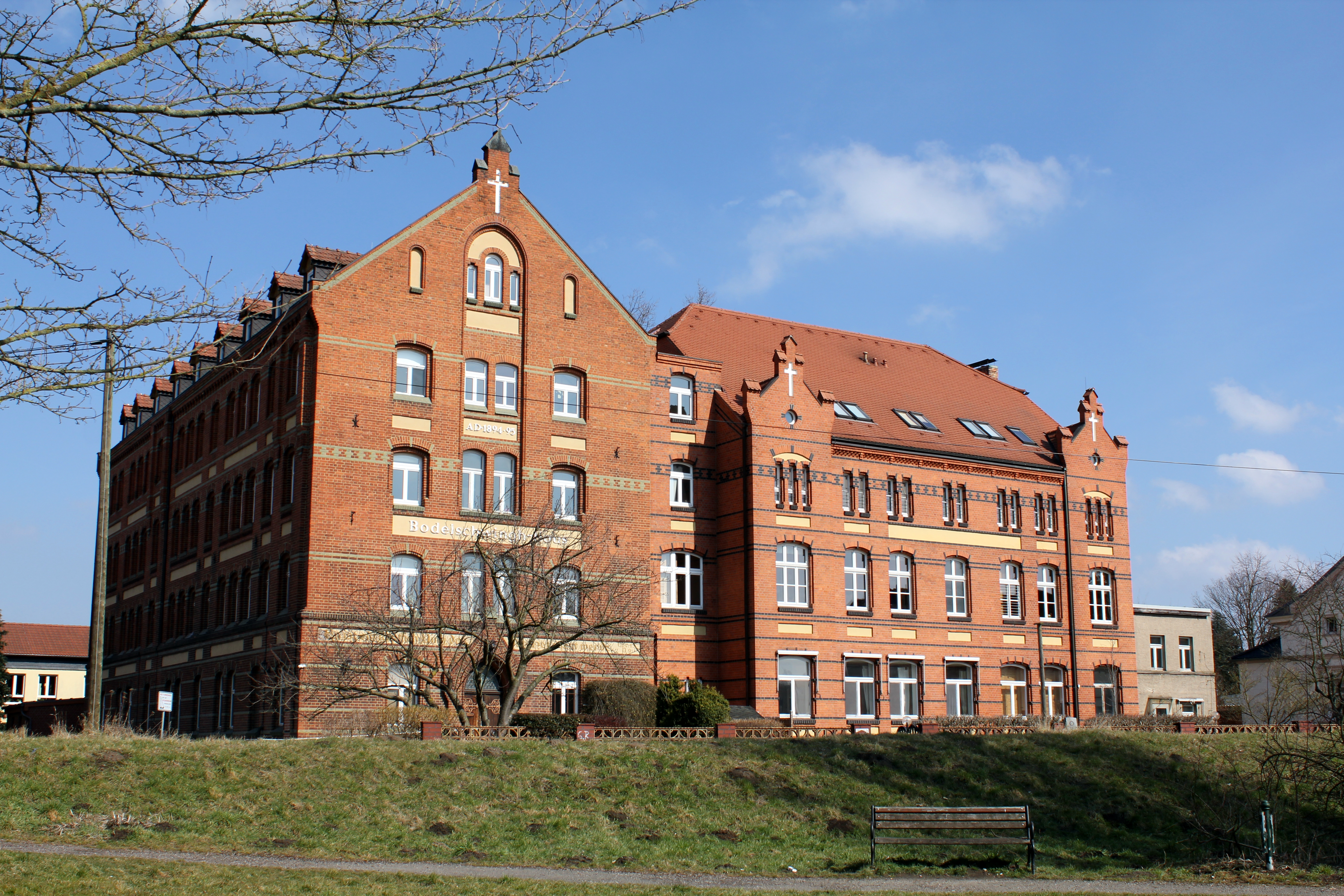 Pflegeheim Bodelschwinghhaus, Bleicher Weg 1, Wolmirstedt